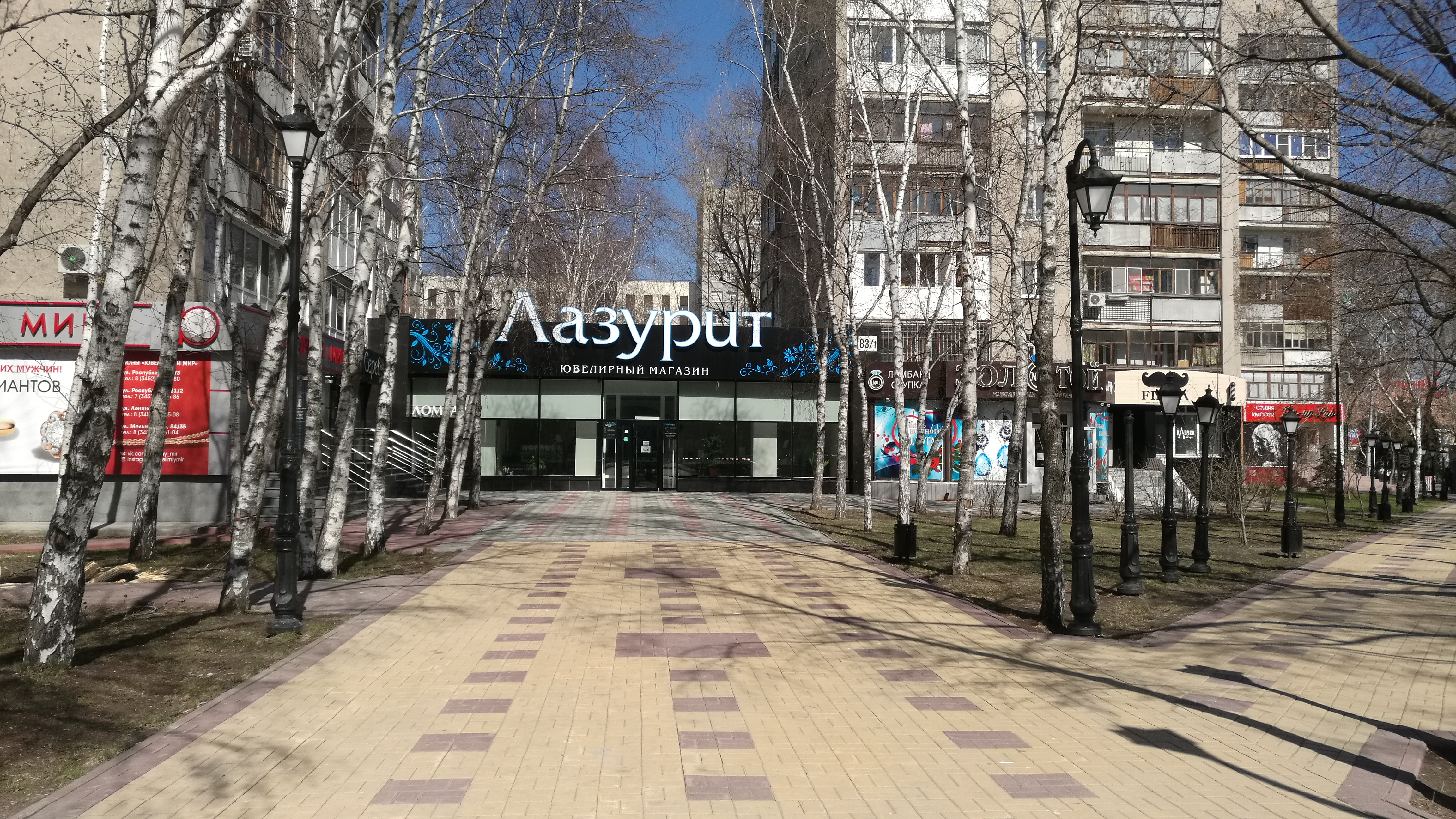 Strato Lenin. Tjumeno, Rusio.